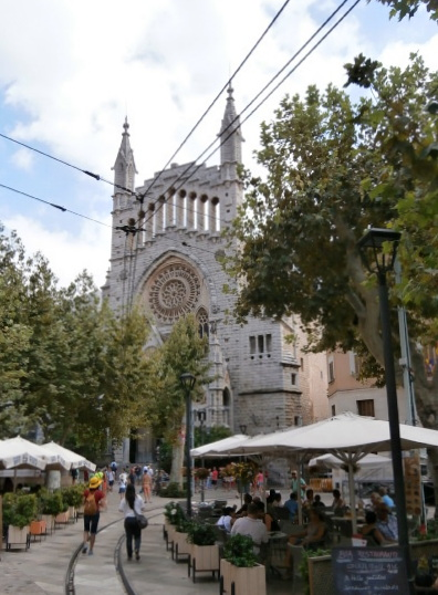 Kirche in Sóller